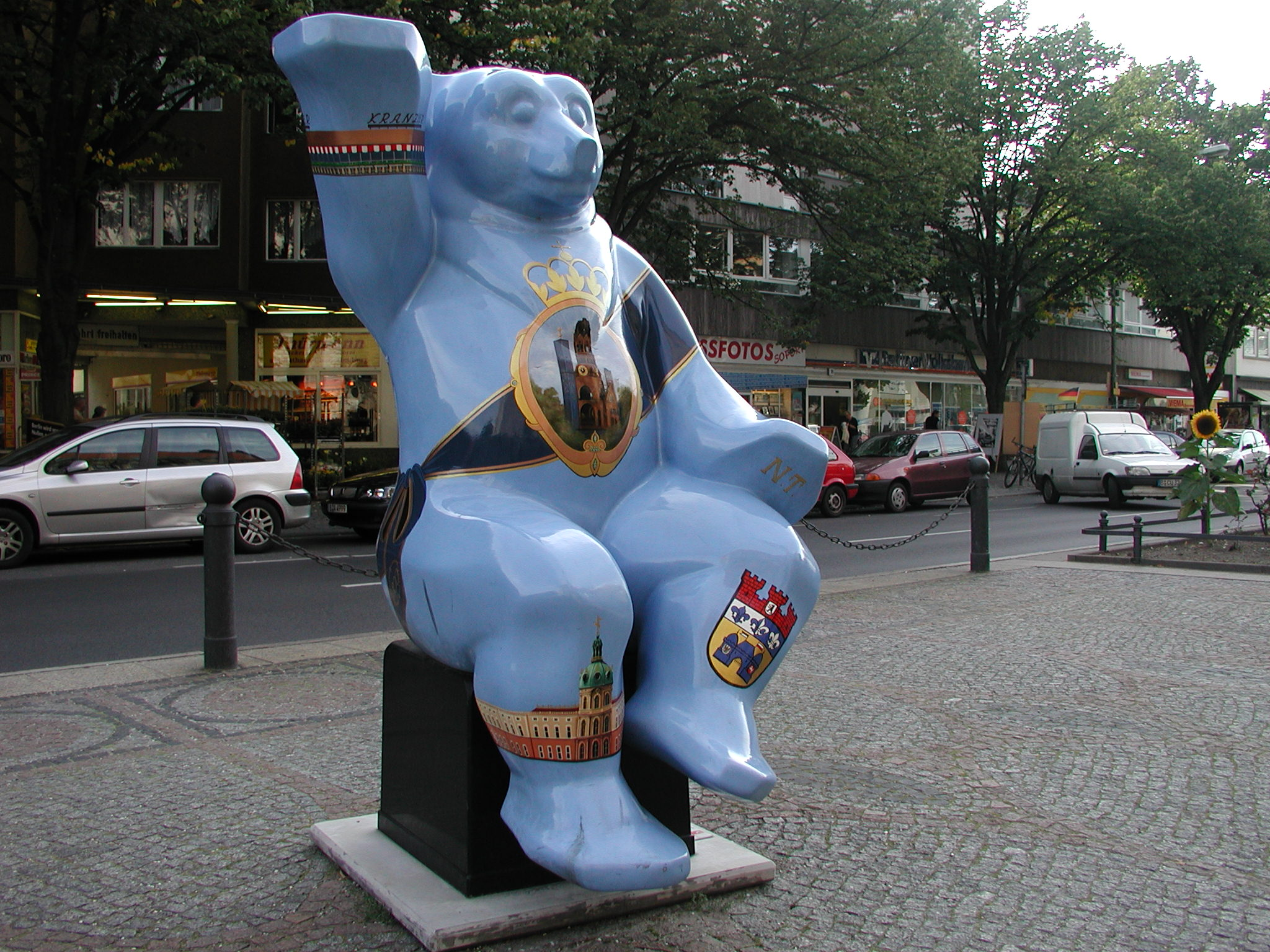 Buddy-Bär